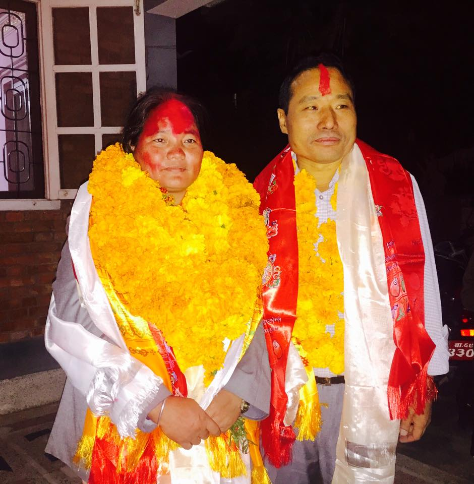 नेपाली: ओनसरी घर्तिमगर पतिसँग